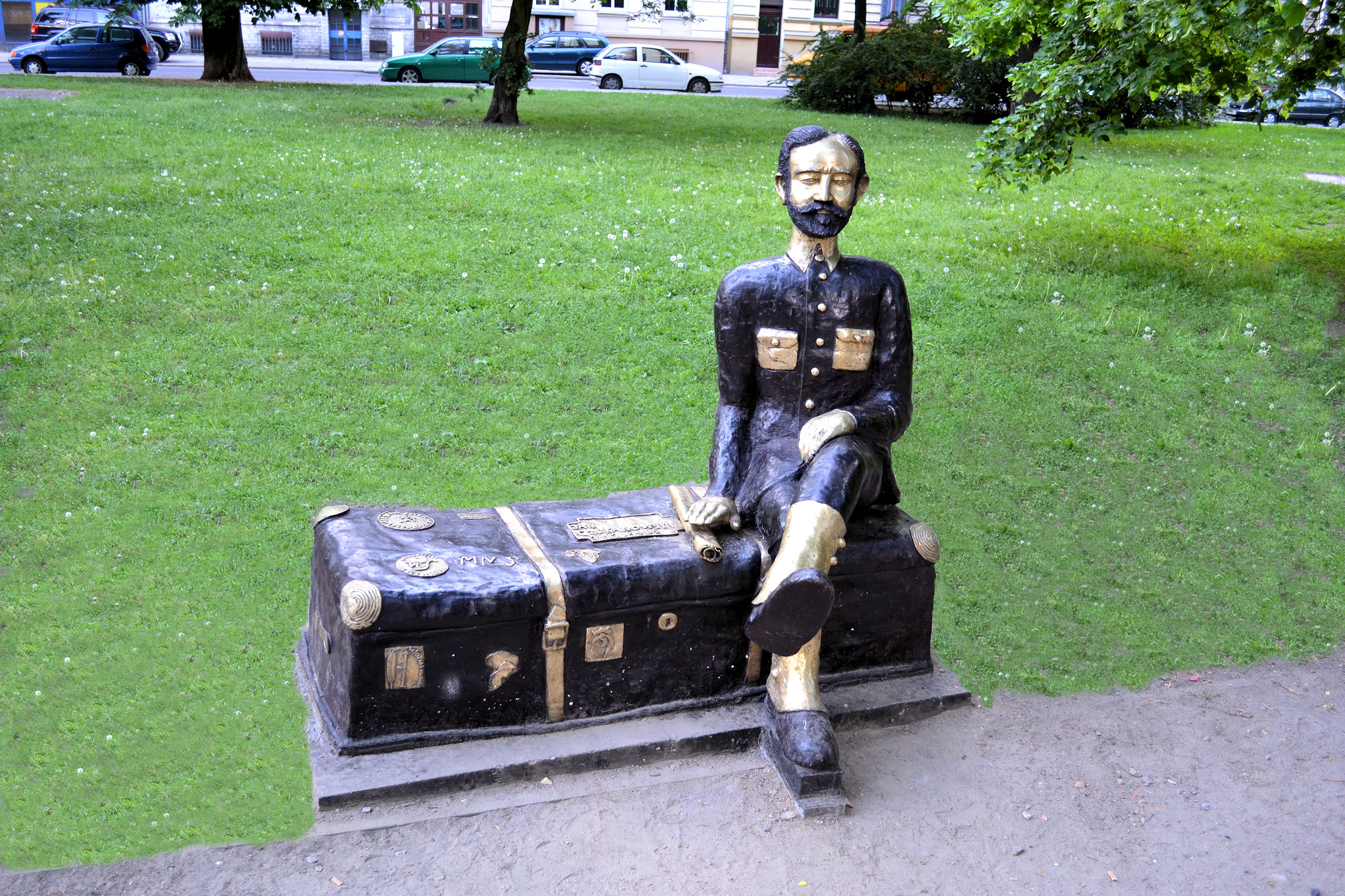 Pomnik Jana Czekanowskiego na pl. Andersa w Szczecinie (odsłonięcie - maj 2012)